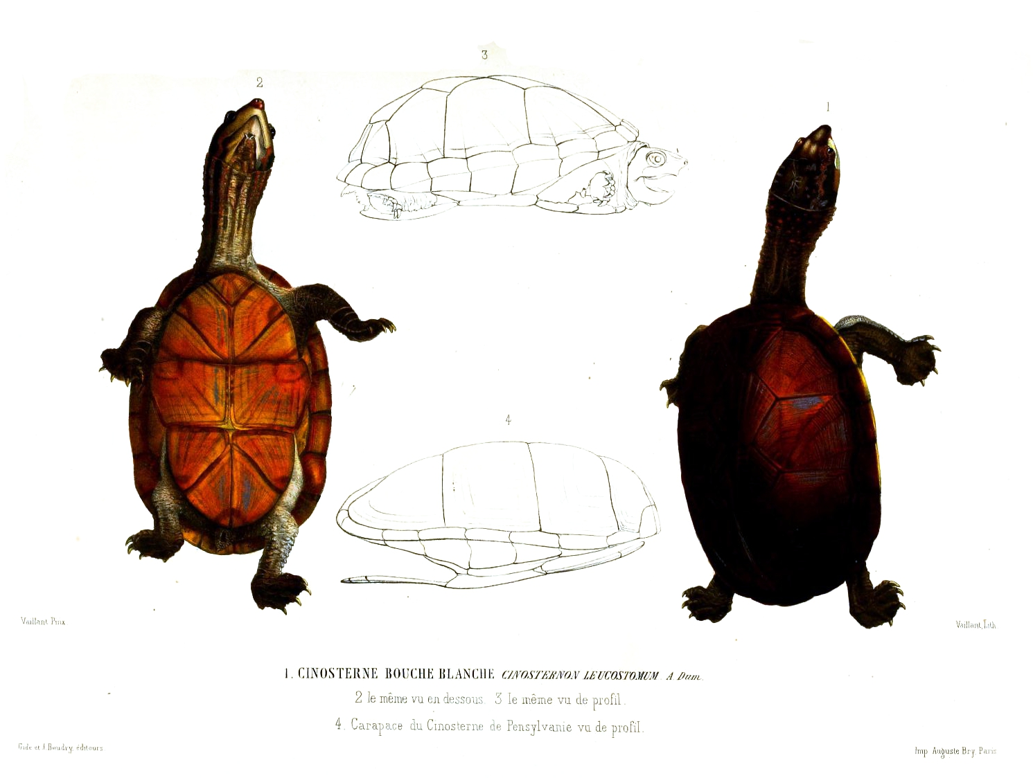 Cinosternon leucostomum